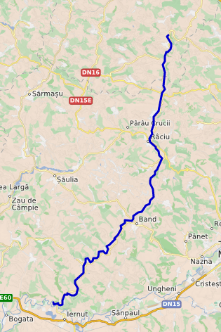 carte réalisée sur umap This map may be incomplete, and may contain errors. Don't rely solely on it for navigation.